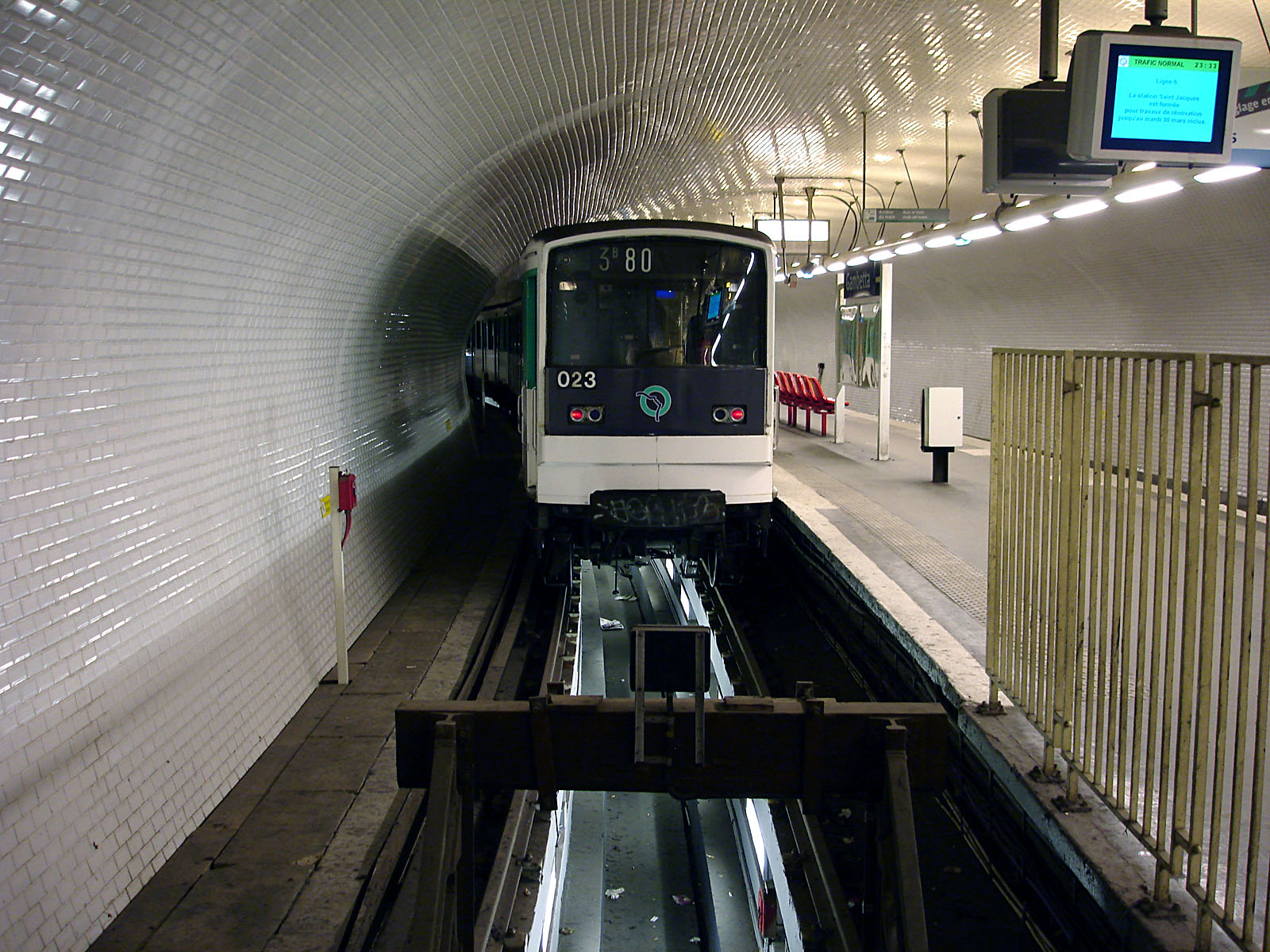 La station Gambetta de la ligne 3 bis du métro de Paris, France.